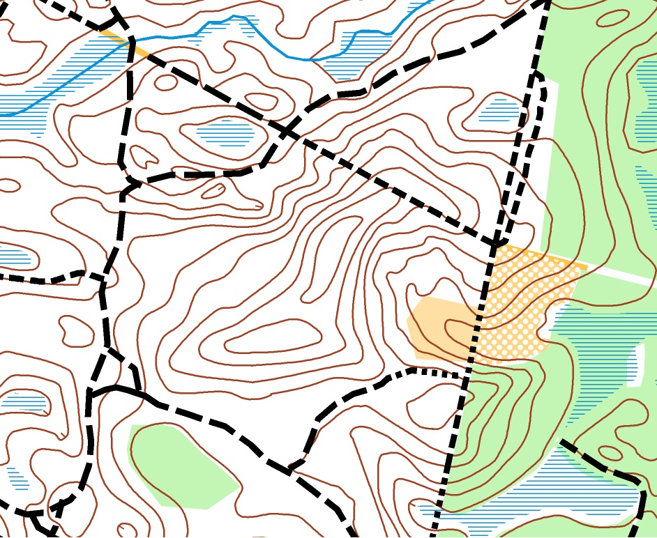 Marjumägi orienteerumiskaardil